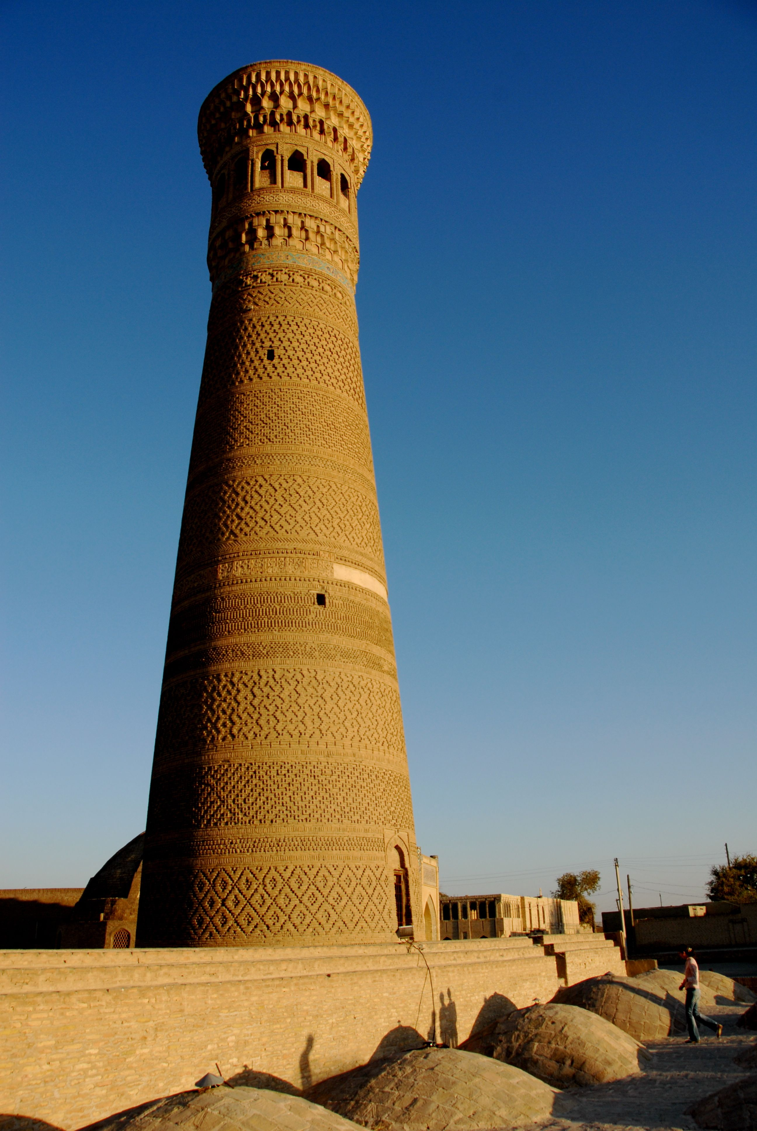 Bukhara Kalyan Minaret 23-Sep-2008